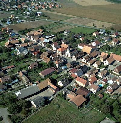 Village vue du ciel